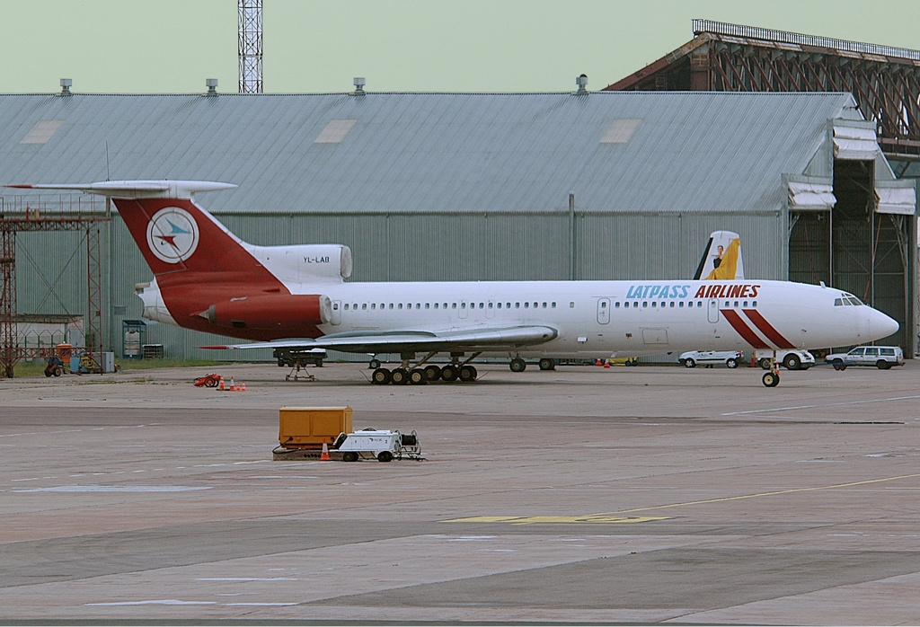 Latpass Airlines Tupolev Tu-154B-2